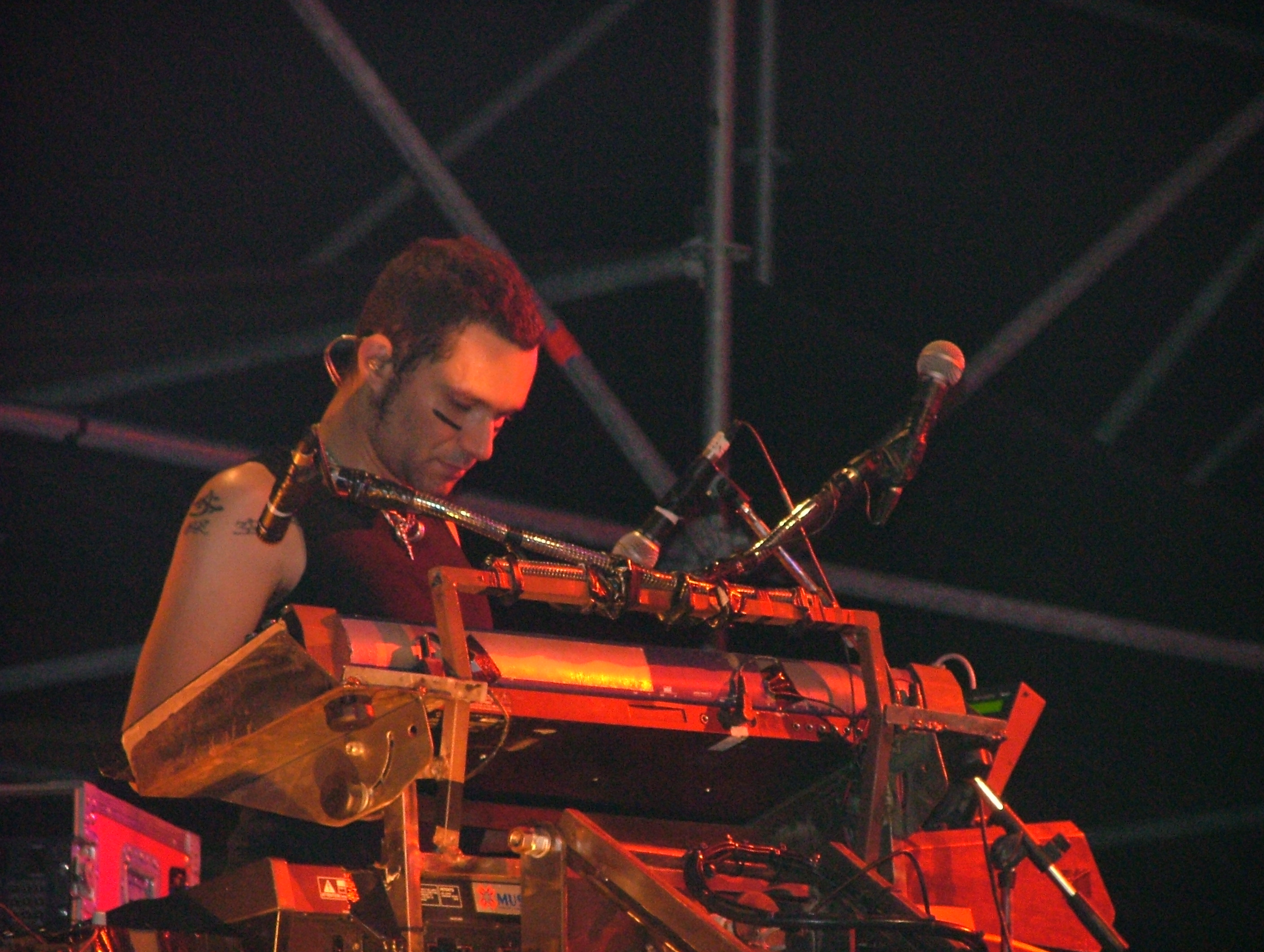 Subsonica live a Castagnole delle Lanze (AT) 31 agosto 2005